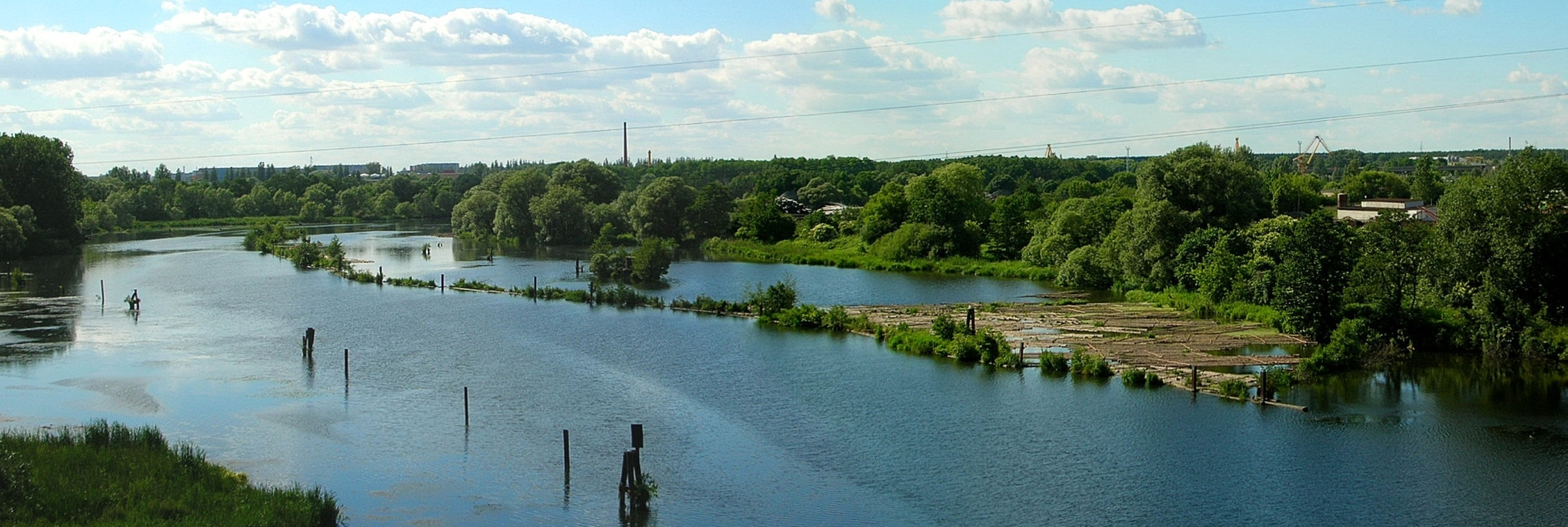 Rozlewiska Brdy (port drzewny) na os. Siernieczek - Zimne Wody w Bydgoszczy, widok z mostu kolejowego